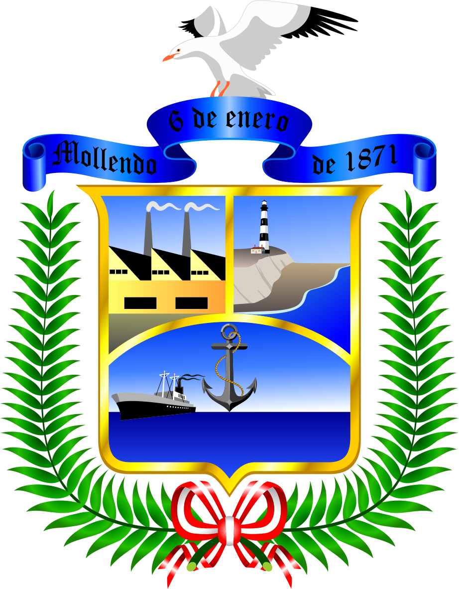 Distrito de Mollendo - Provincia de Islay - Región Arequipa